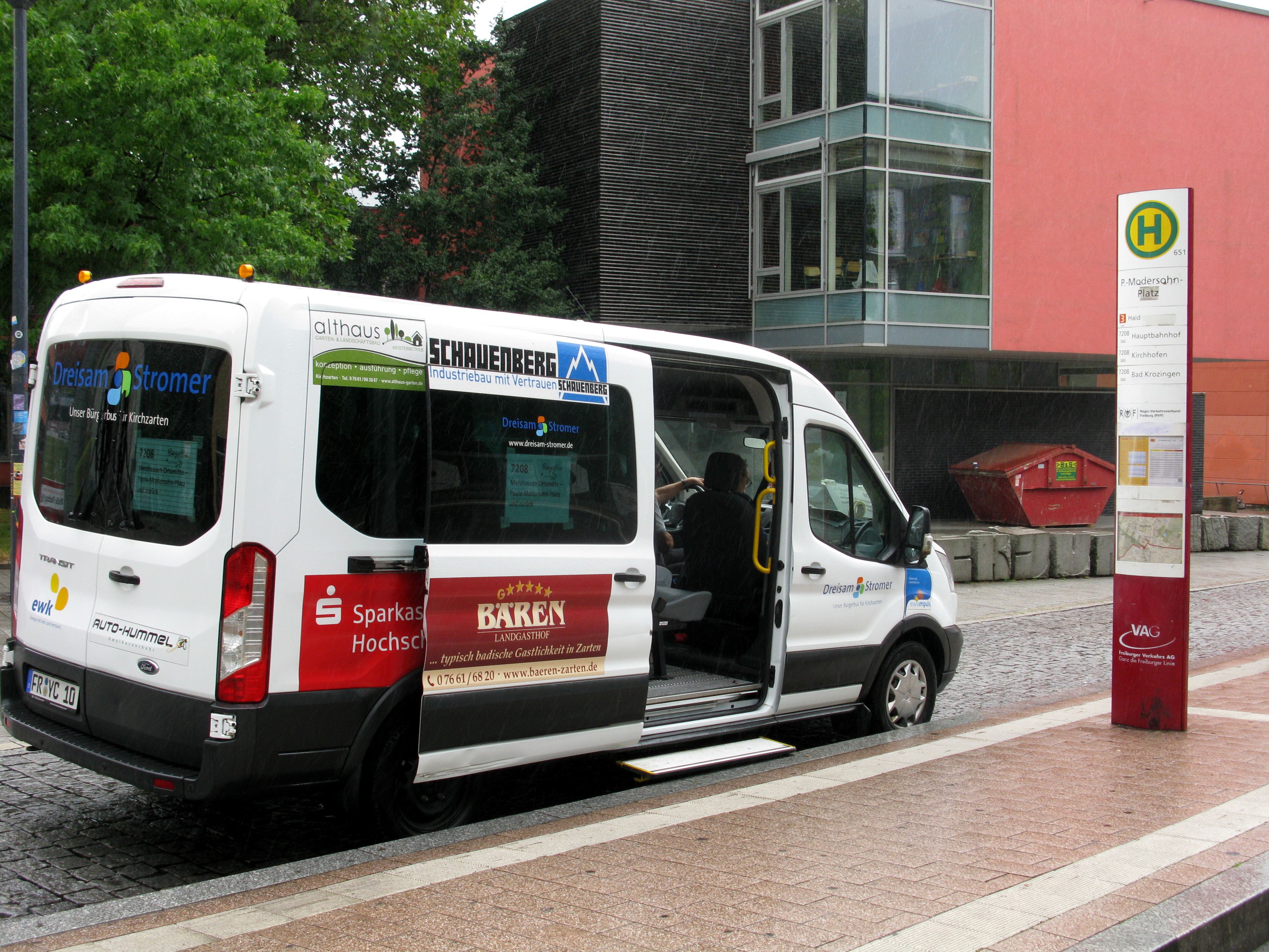 Der Kirchzartener Bürgerbus "Dreisam-Stromer" verkehrt sonntags zwischen Merzhausen und Freiburg-Vauban. Hier steht er am Paula-Modersohn-Platz.